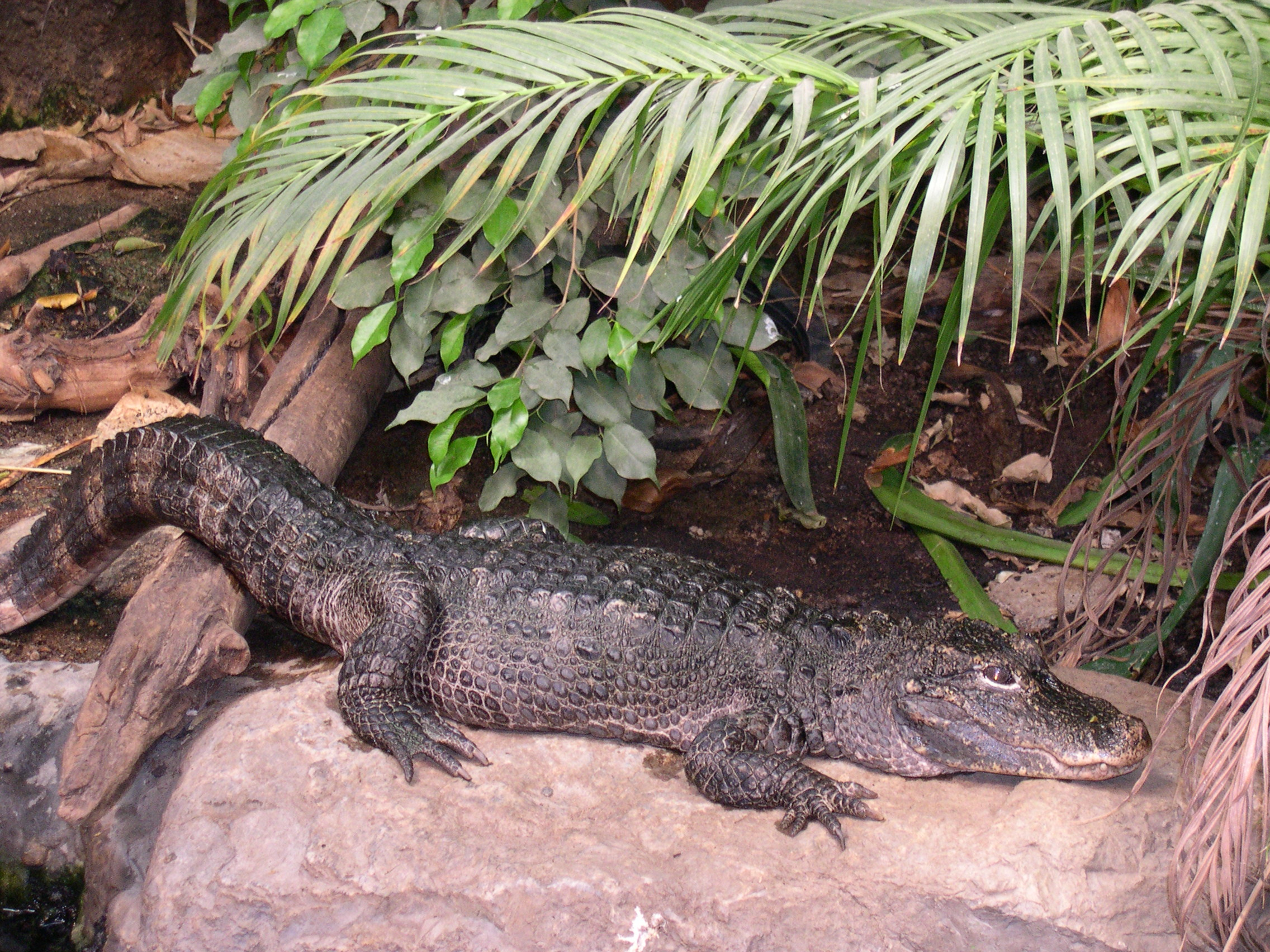 Alligator sinensis in Rotterdam Zoo